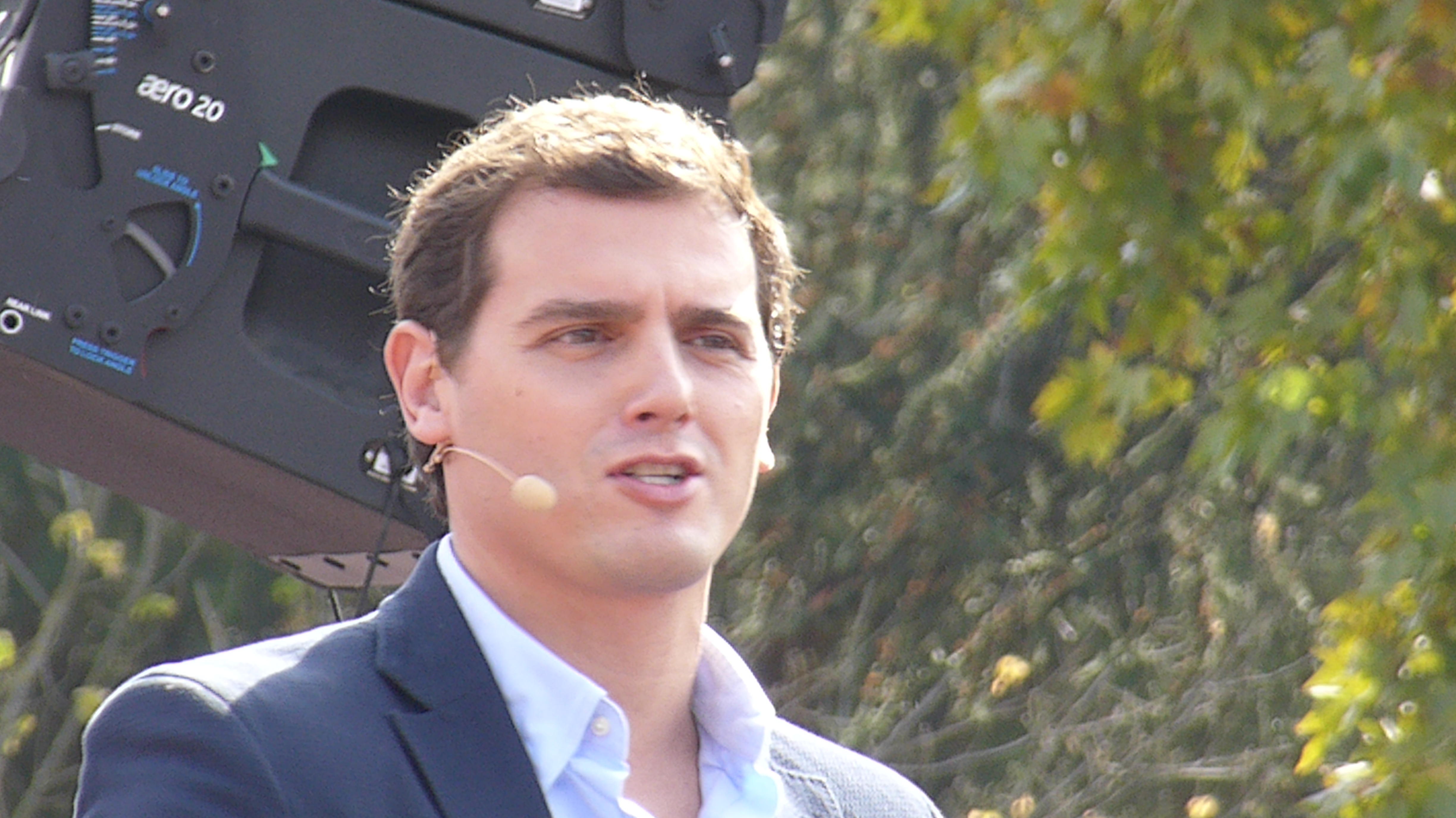 Retrato de Albert Rivera, durante un acto preelectoral (antes de las elecciones generales), al aire libre, en la explanada del Templo de Debod, en Madrid, el 25 de octubre de 2015. Albert Rivera Díaz es el presidente de "Ciudadanos-Partido de la Ciudadanía".